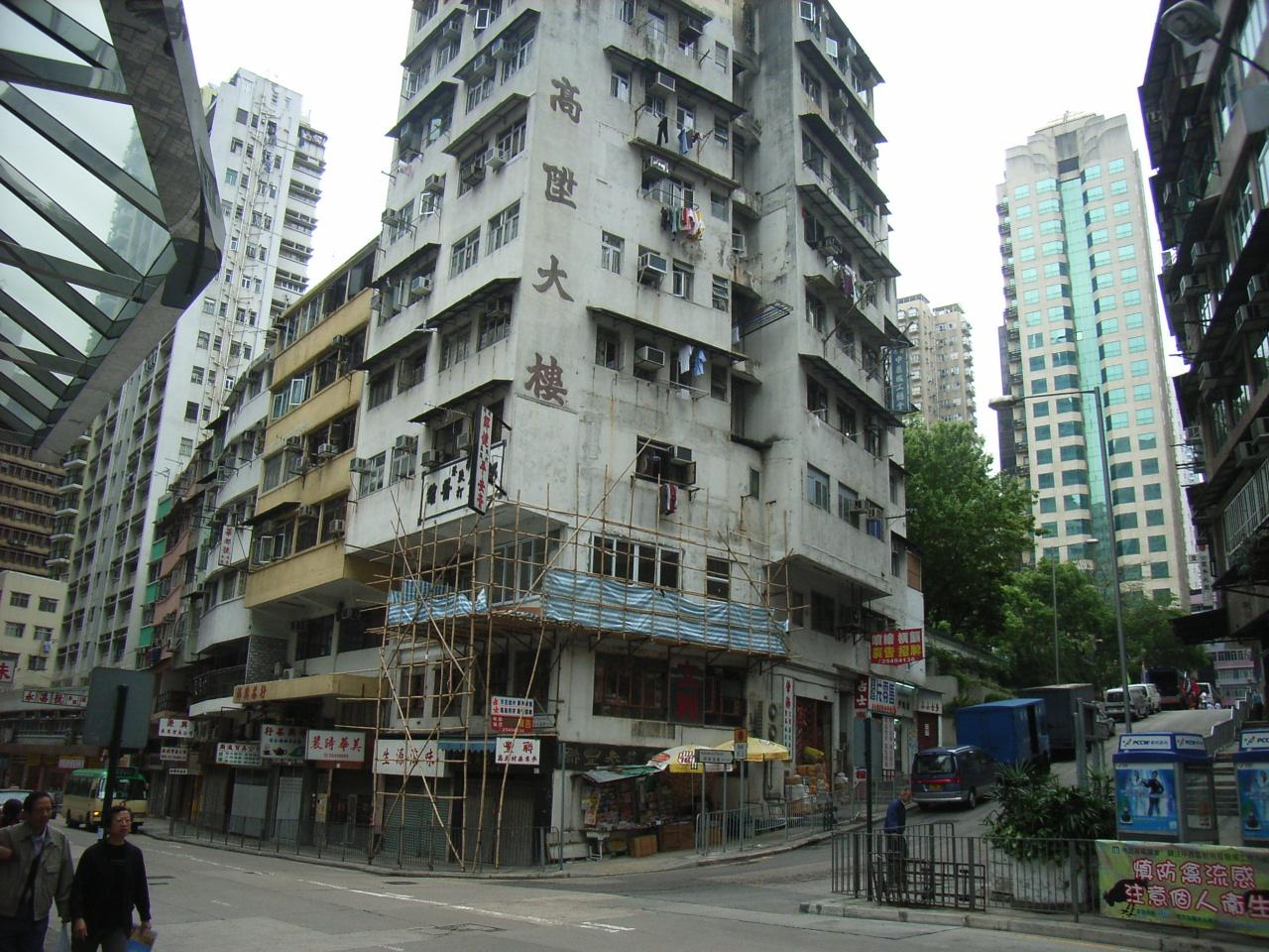 高陞街鄰近zh:荷李活道 當地也有一座大廈名叫zh:高陞大樓Ko Shing Building 位於zh:皇后大道西80號 (註:zh:高陞大廈在西環另有兩幢在別處